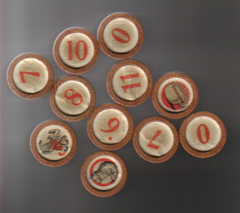 Eigen foto